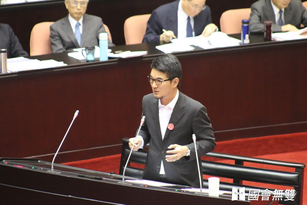 中文（台灣）: 民進黨立委劉建國就總預算提出質詢，質疑明年度歲出激增的必要性。